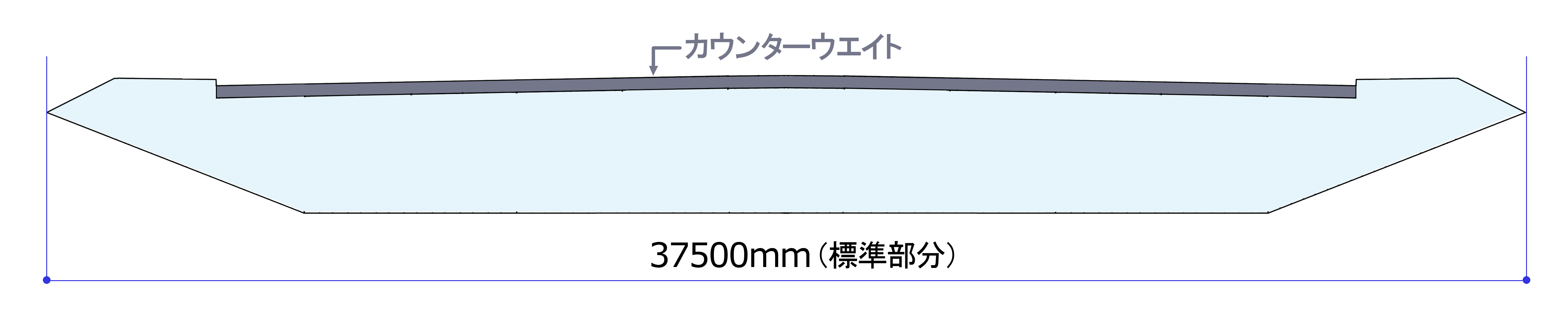 名港東大橋の主桁断面図（典拠：『橋梁』Vol.28 No.9 1992年9月号、39頁から図を簡略化して記載）